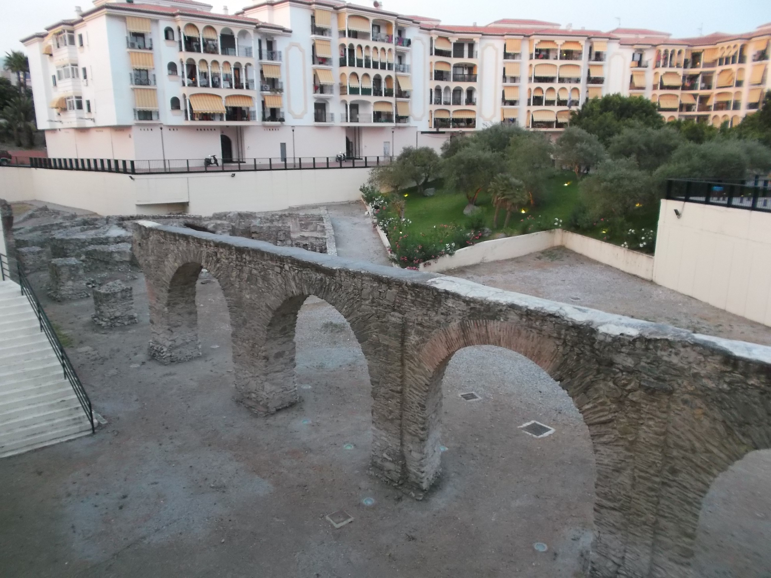 Tramo del acueducto romano en el casco urbano de Almuñécar.